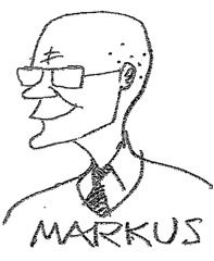 Selbstporträt